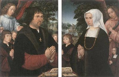 Lieven van Pottelsberge en zijn vrouw Livina van Steelandt door Gerard Horenbout (± 1465, Gent, ± 1541, Londen) Tweeluik in olieverf op hout, elk paneel 43cm x 33,5cm Museum voor Schone Kunsten, Gent Wikidata has entry Q26250180 with data related to this item.